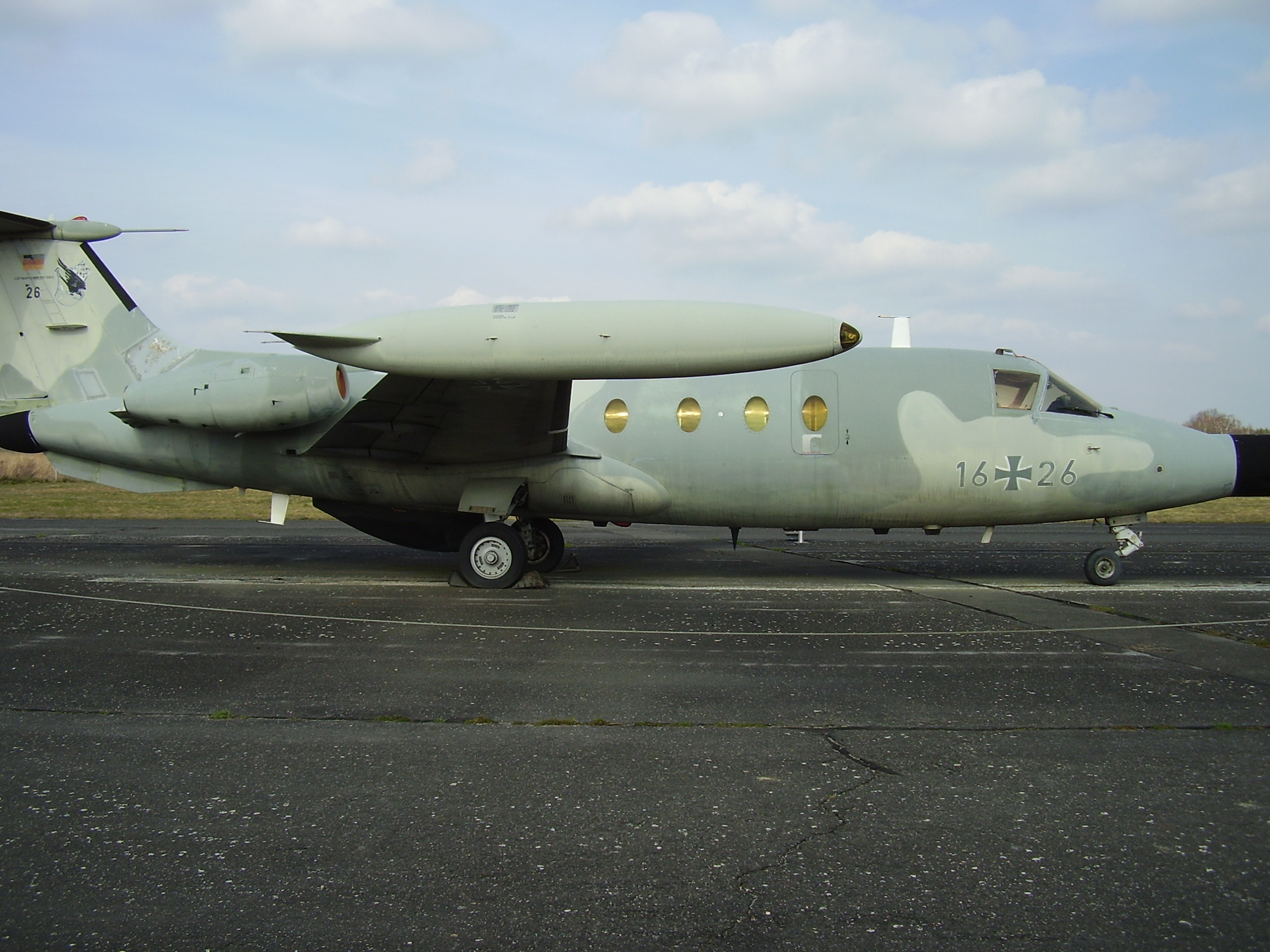 Luftwaffenmuseum der Bundeswehr; Airforce Museum of the Bundeswehr; Berlin-Gatow